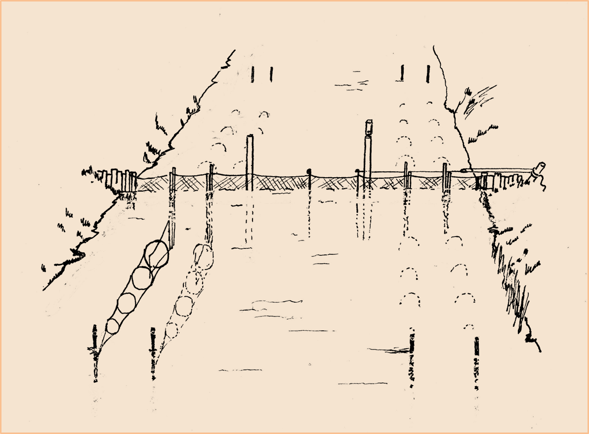 tussen de beide oevers staat een stel netten die de doorgang voor vissen afsluiten; haaks daarop staan de fuiken